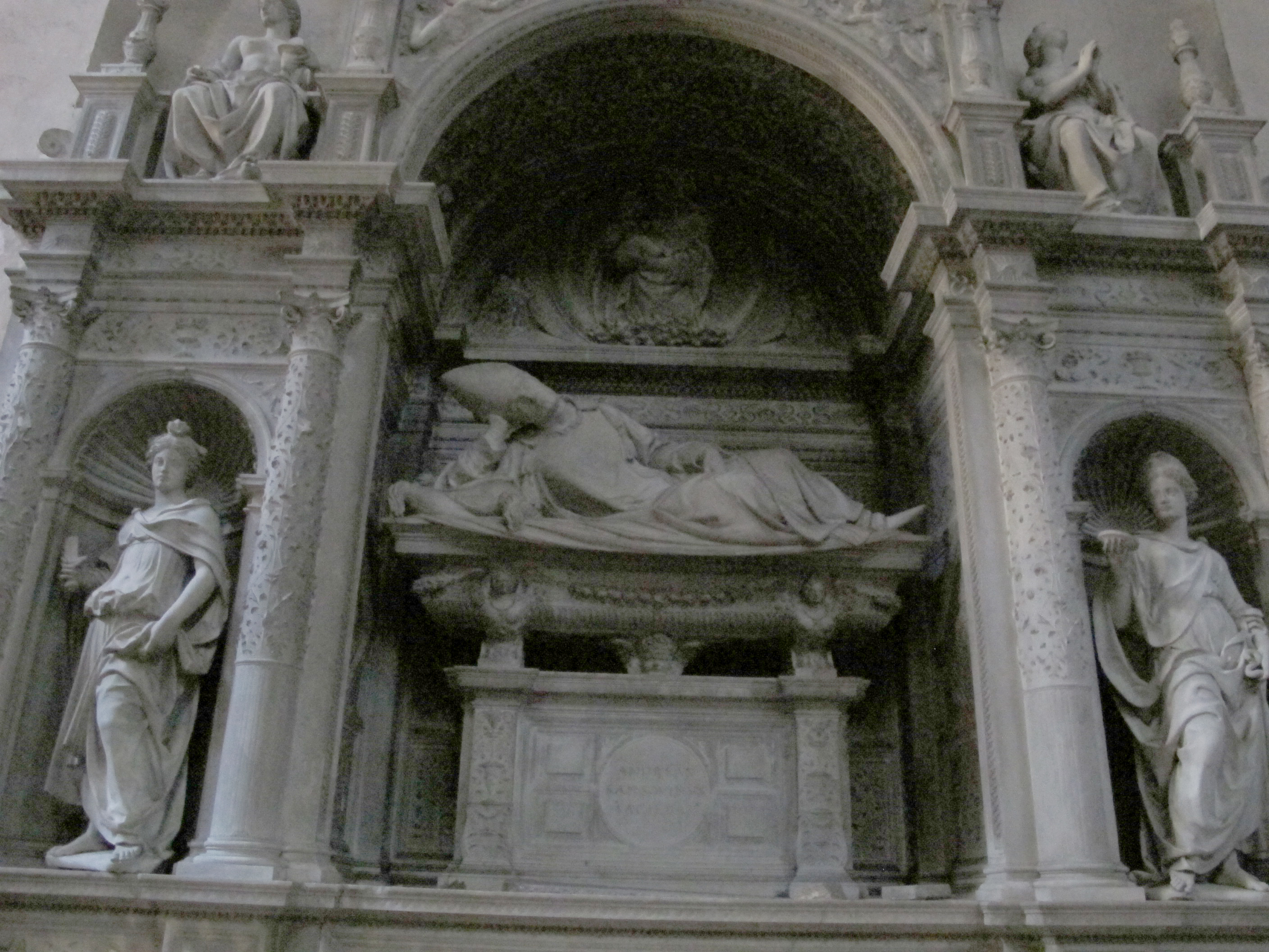 Sansovino, monumento funebre di ascanio sforza